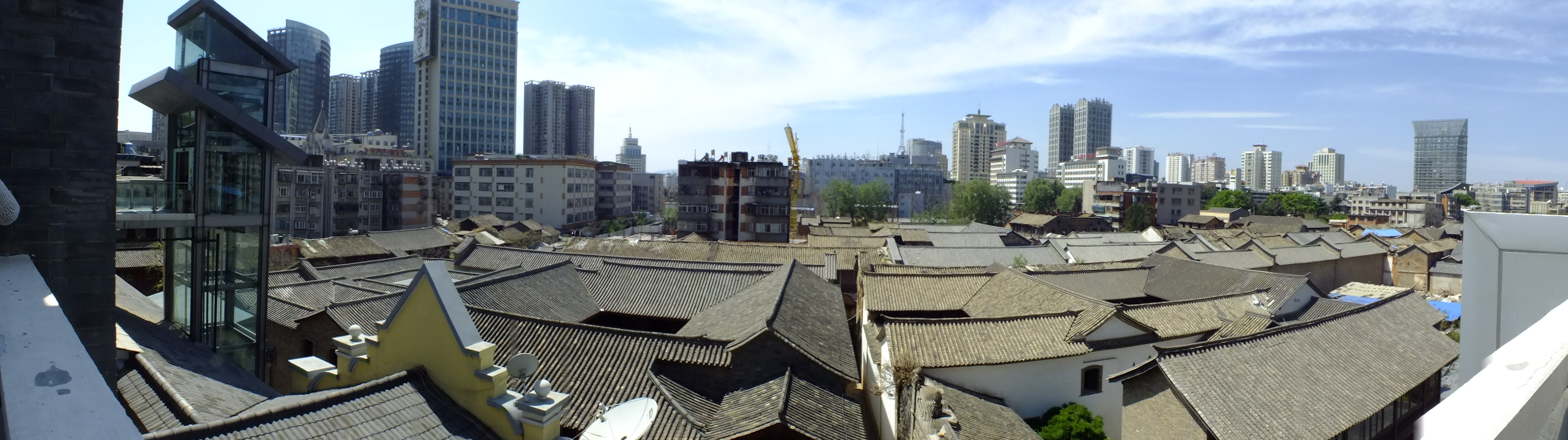 2015-03-20 Wuhua District, Yunnan, Kunming(雲南省昆明市五華区, 中国)